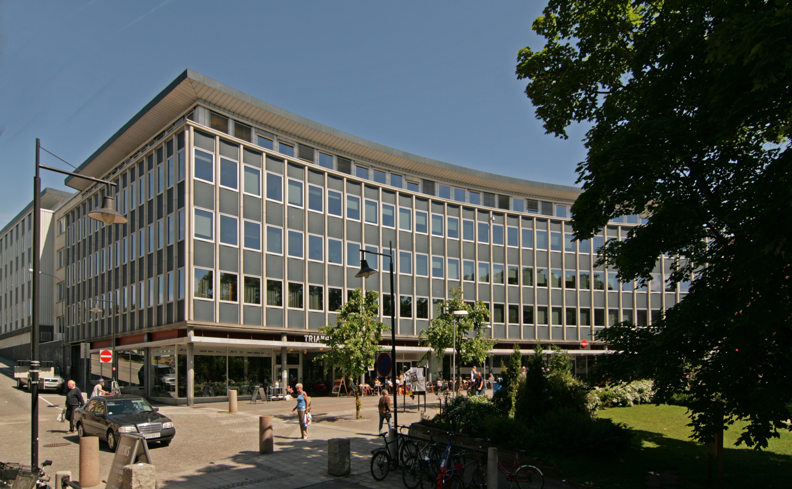 Triangelgården, Torggata 63/65, Hamar, Norway. Erected 1962.